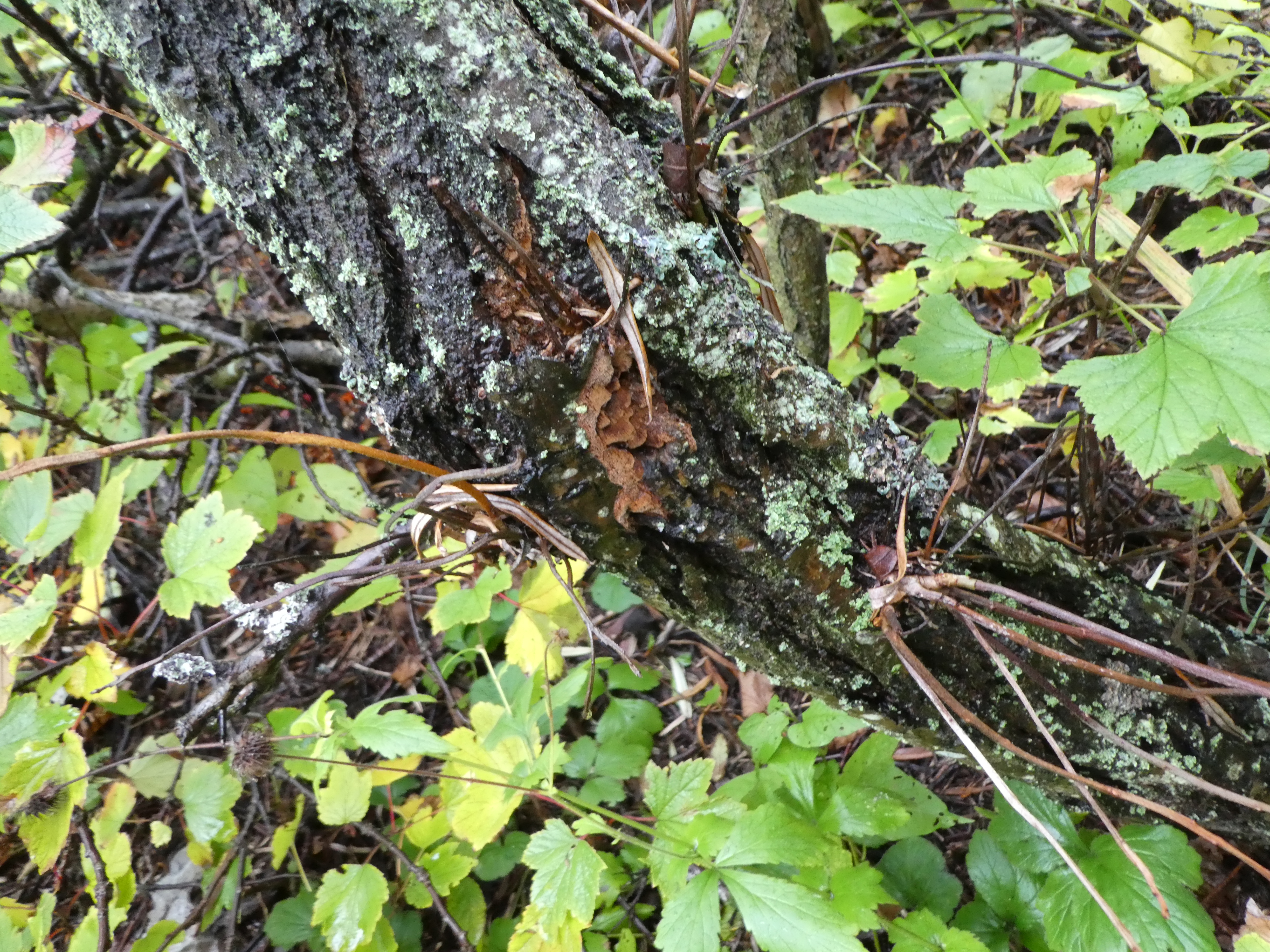 Konttakääpä tyrnillä Porin Reposaaressa